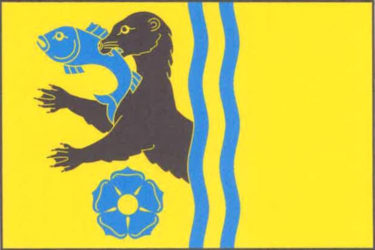 Vydří vlajka